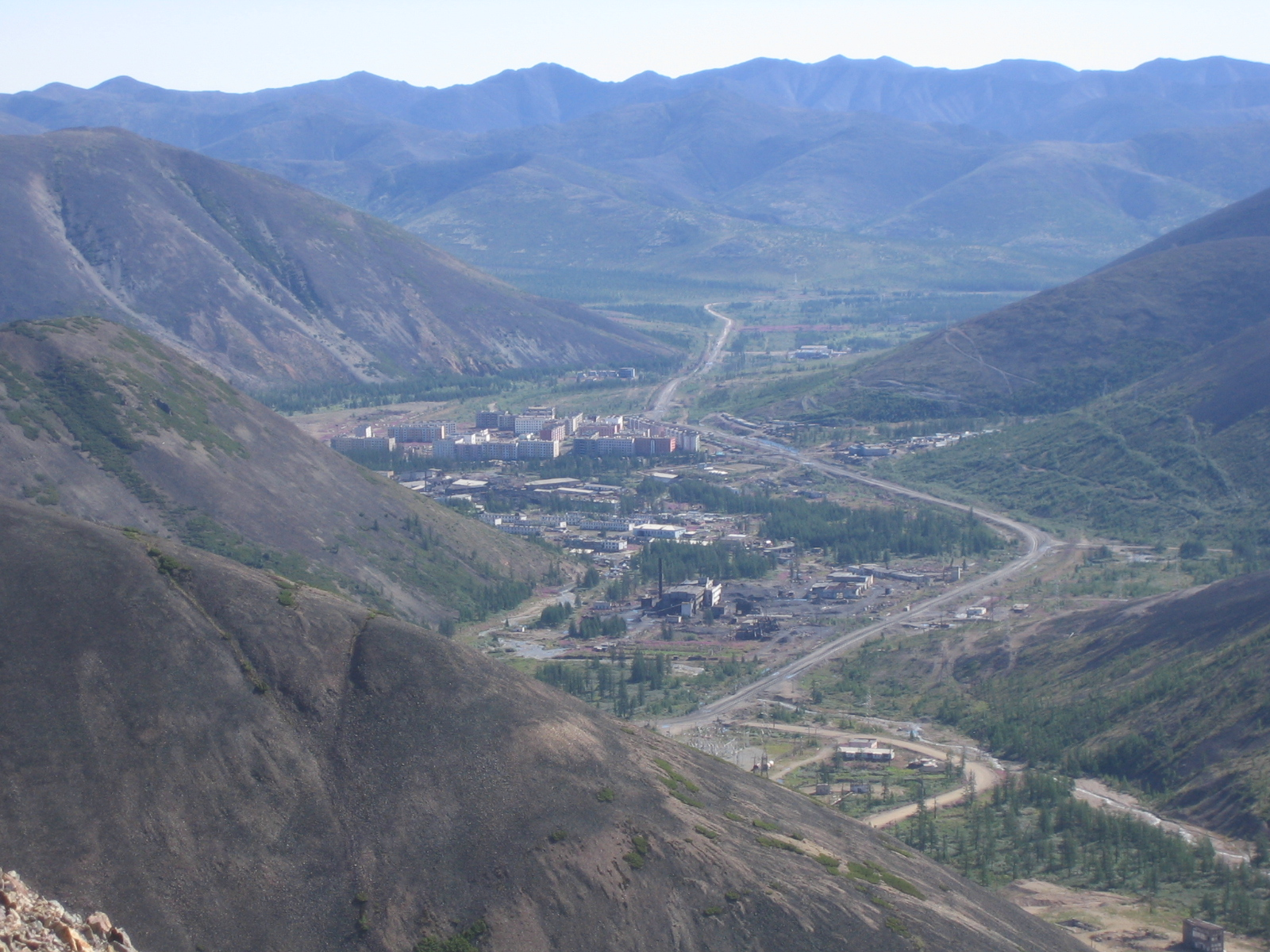 View on Dukat settlement